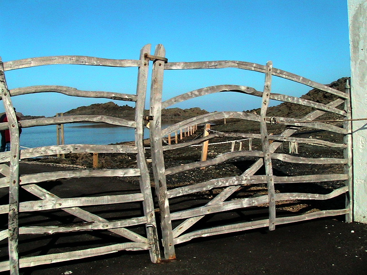 Cap de Favàritx (Menorca): típica tanca feta amb rames d'ullastre This is a a photo of a natural area in the Balearic Islands, Spain, with id: ES530004